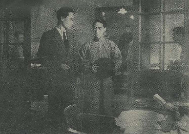 自由神 剧照《美术电影》1935 年 24页